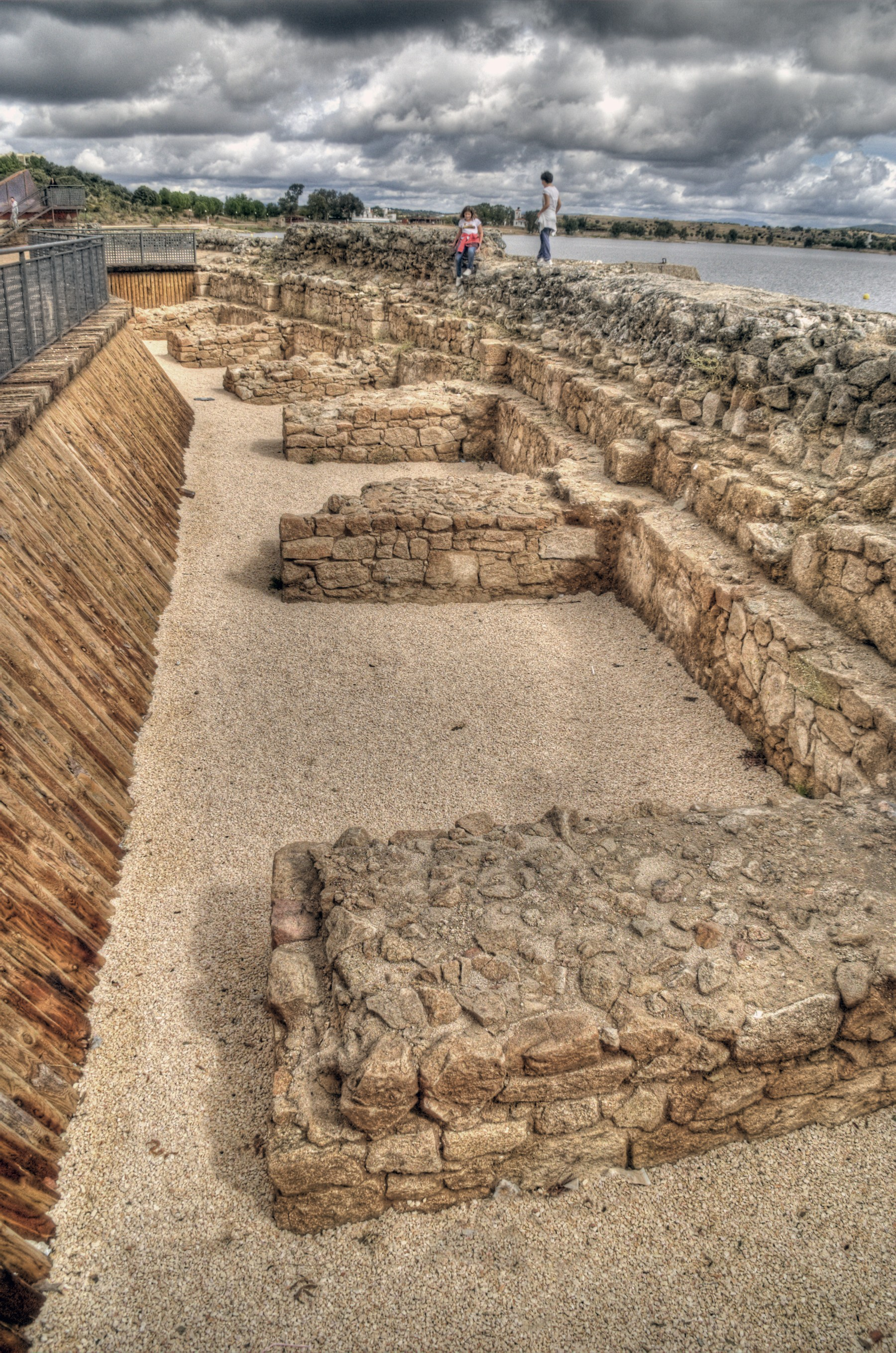 Muro de la presa que abastecía de agua a Emérita Augusta mediante el acueducto de los Milagros.